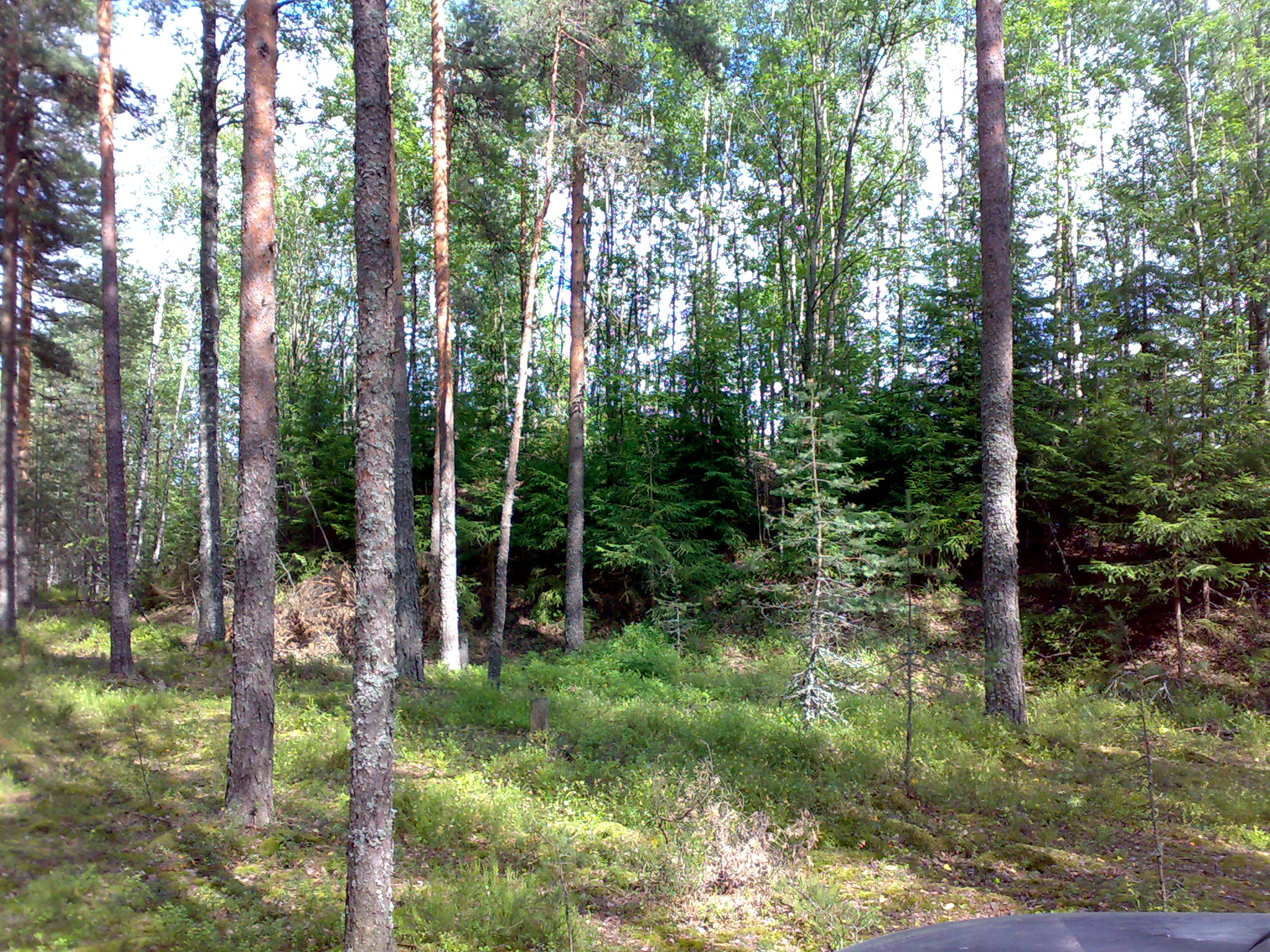 Forest